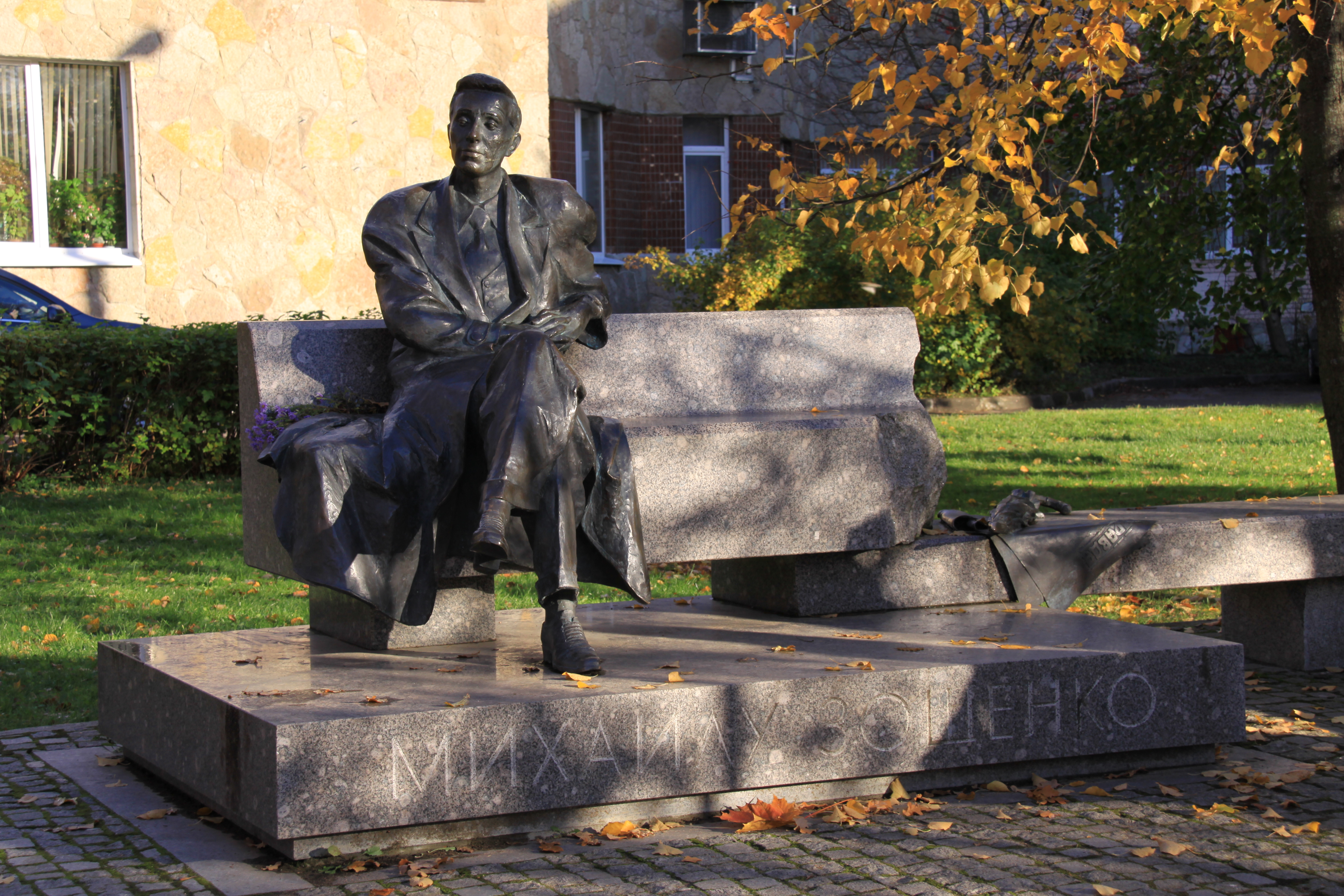 Открыт 14 сентября 2003 года в г. Сестрорецке на ул.Токарева рядом с Центральной районной библиотекой им.М. М. Зощенко. Скульптор В. Ф. Онешко, архитектор Н. Н.Соколов.